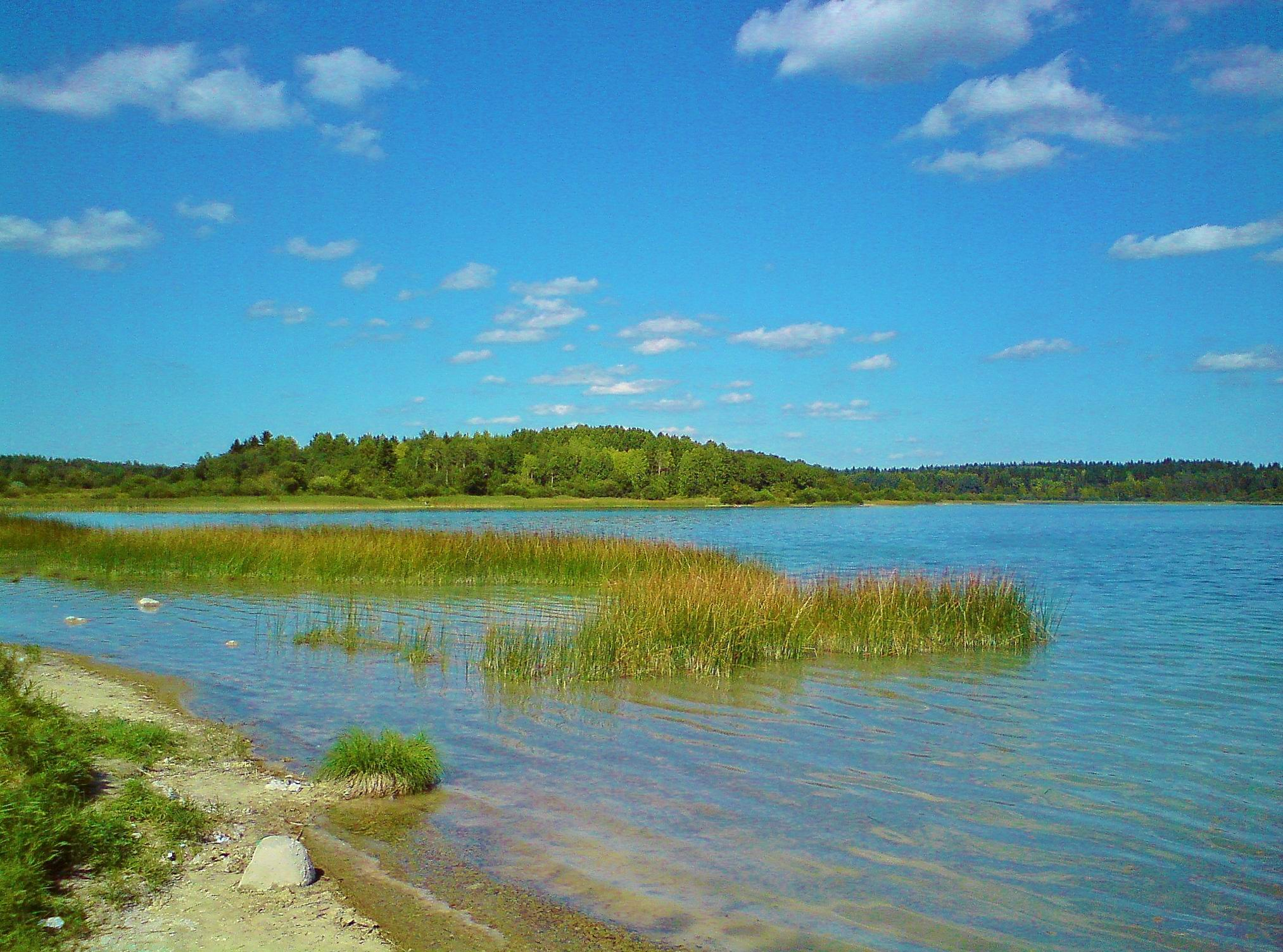 Кюрлевский карьер